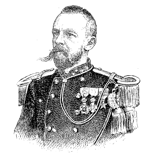 Gravure de Francis Dhanis, "vainqueur des arabes". Extrait du PDF, page 18 du livre. Titre : Soldats et missionnaires au Congo, de 1891 à 1894 / par F. Alexis-M. G. [Gochet]... Auteur : Gochet, Alexis-Marie (1835-1910) Éditeur : Desclée, de Brouwer (Lille) Date d'édition : 1896 Sujet : Congo (République démocratique) -- 1885-1908 Type : monographie imprimée Langue : Français Format : 240 p. : portr., pl. ; in-8 Format : application/pdf Droits : domaine public Identifiant : ark:/12148/bpt6k103740j Source : Bibliothèque nationale de France, 8-O3o-78 Relation : Provenance : bnf.fr Date de mise en ligne : 15/10/2007